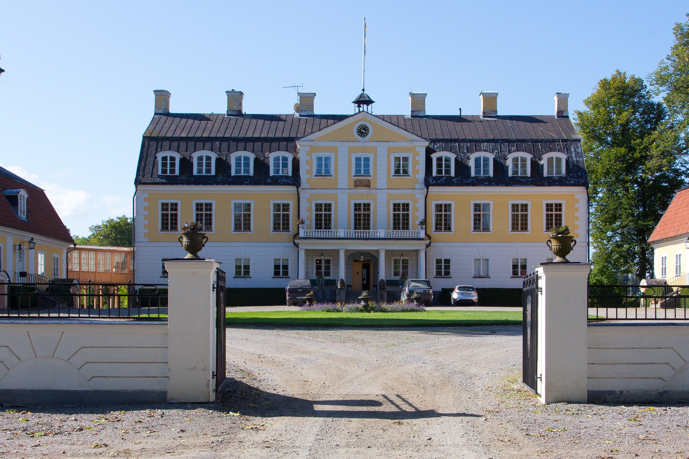 Claestorp, beskuren